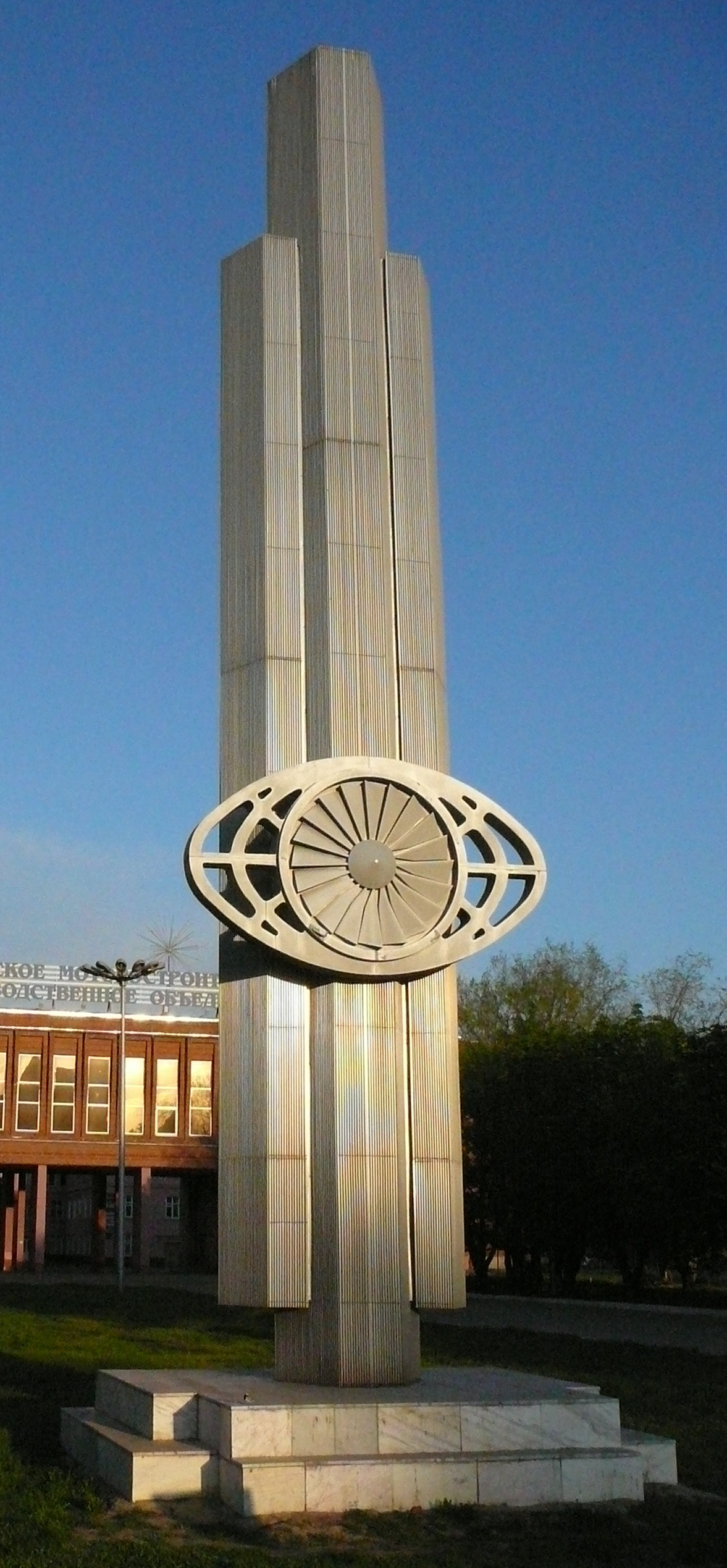 Стела на площади перед административным зданием и проходными ОАО КМПО (г. Казань, 17 мая 2011 г.)